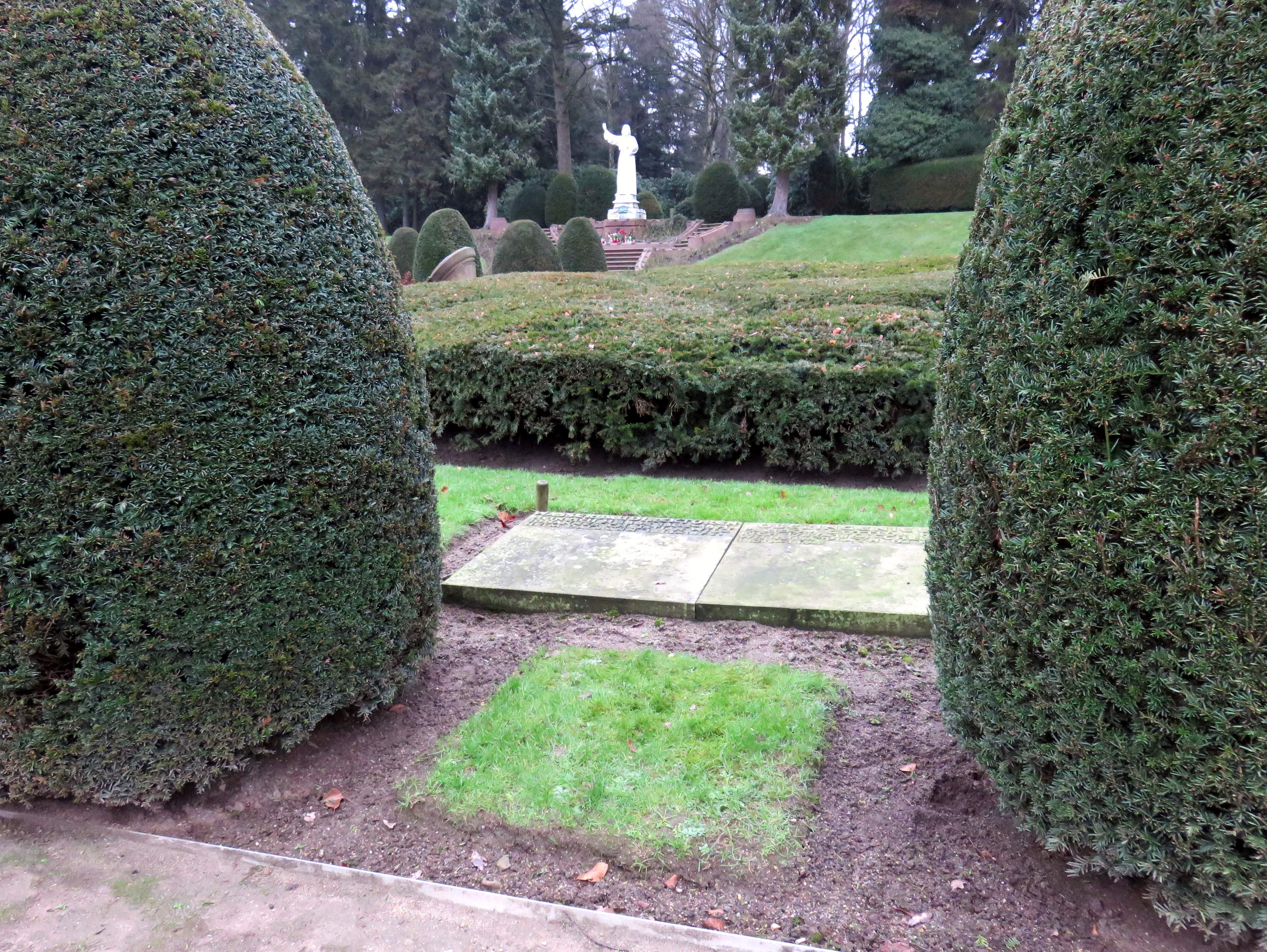 Lage des Sammelgramals zu Ehren des Hamburger Wasserbaudirektors Johannes Dalmann im Bereich des Althamburgischen Gedächtnisfriedhofs auf dem Hamburger Friedhof Ohlsdorf, Querachse südöstlicher Teil.